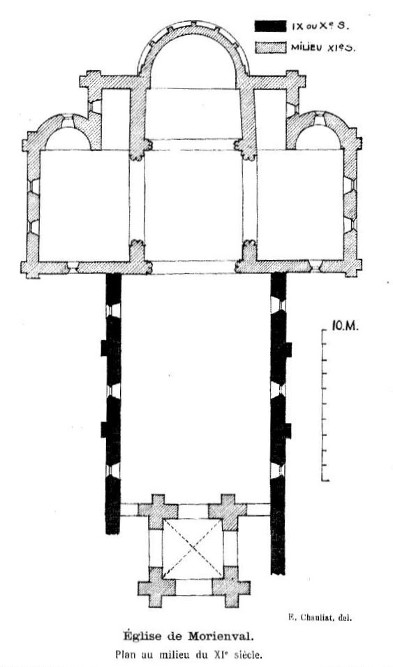 Plan au milieu du XIe siècle, après la construction de la première abside romane, des deux tours du choeur et du transept.